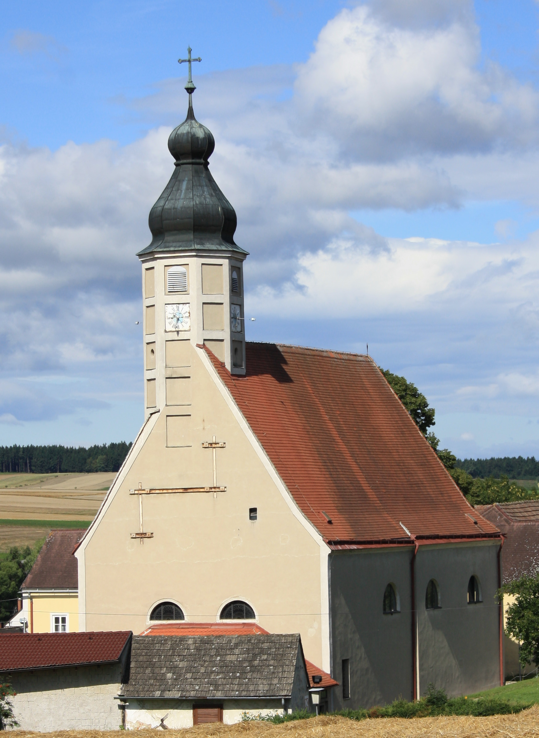 Röm. Kath. Pfarrkirche in Windigsteig, Bezirk Waidhofen/Thaya, Austria